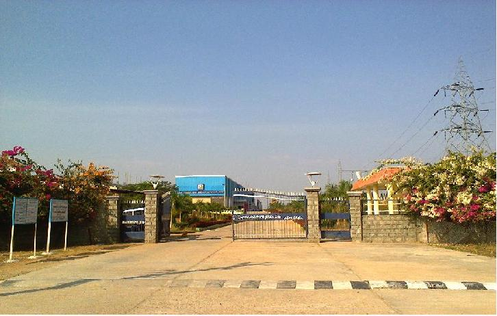 జూరాల జల విద్యుత్ కేంద్రం